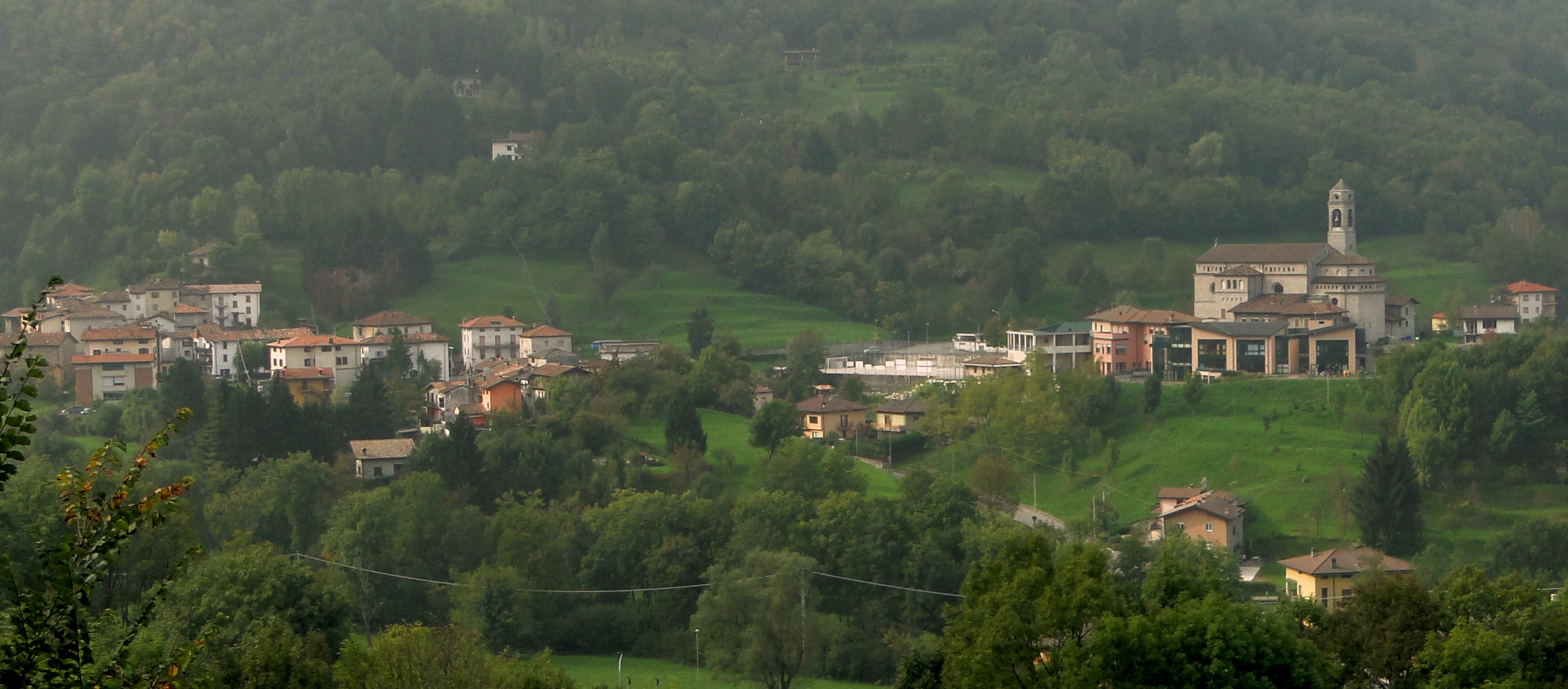 Fiobbio di Albino (BG), panorama